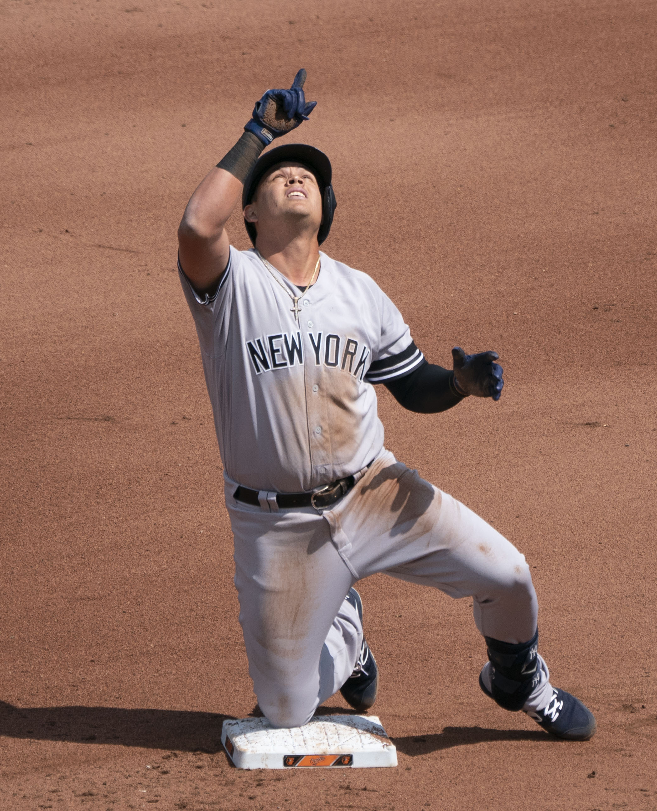 Yankees at Orioles 4/7/19